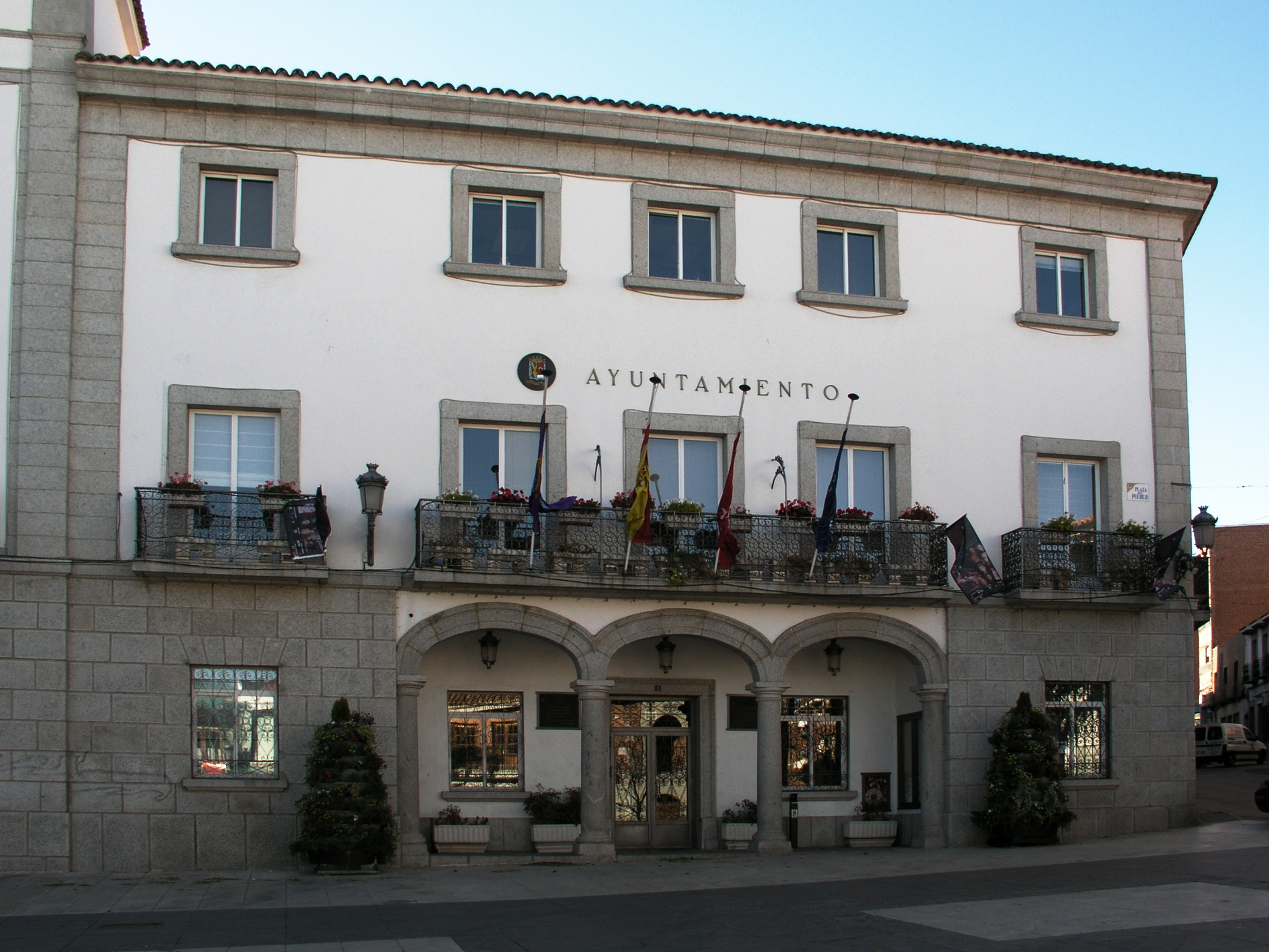 Colmenar Viejo, Madrid, Spain. Ayuntamiento.